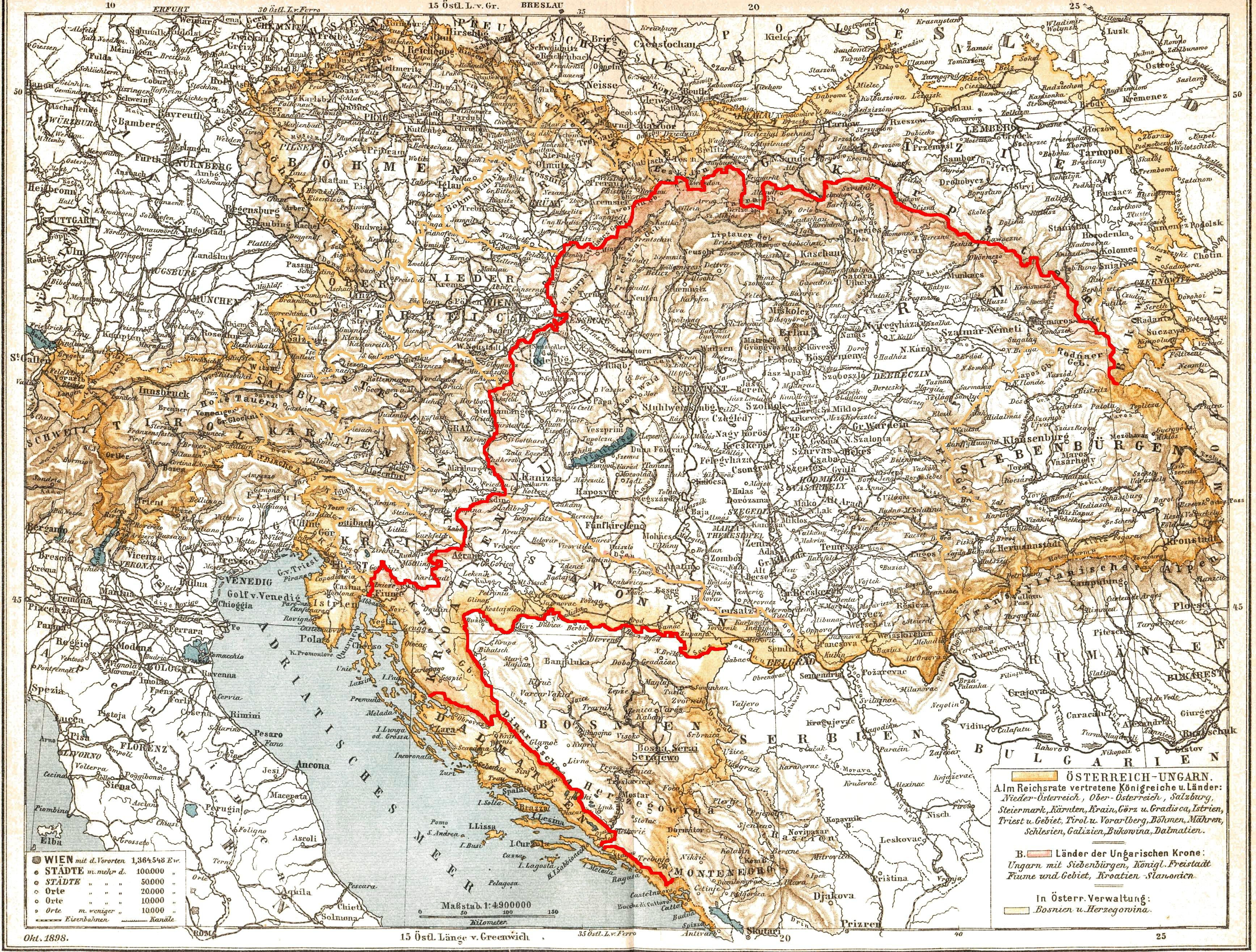 Van de Duitse wiki + verduidelijking landsgrenzen. Afbeelding van volgende pagina: beschrijving aldaar